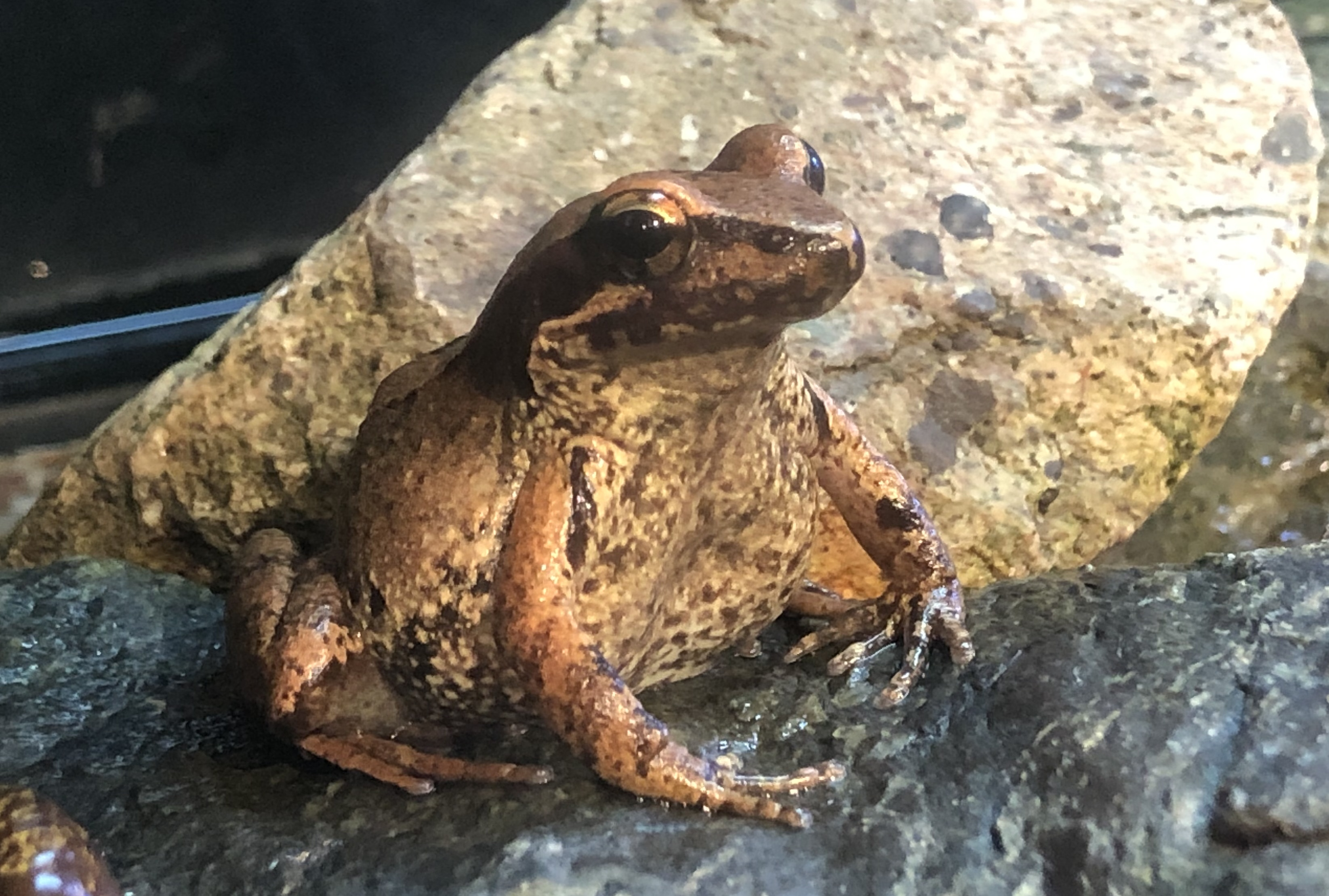 タゴガエルの亜種、オキタゴガエル。島根県立しまね海洋館飼育個体。